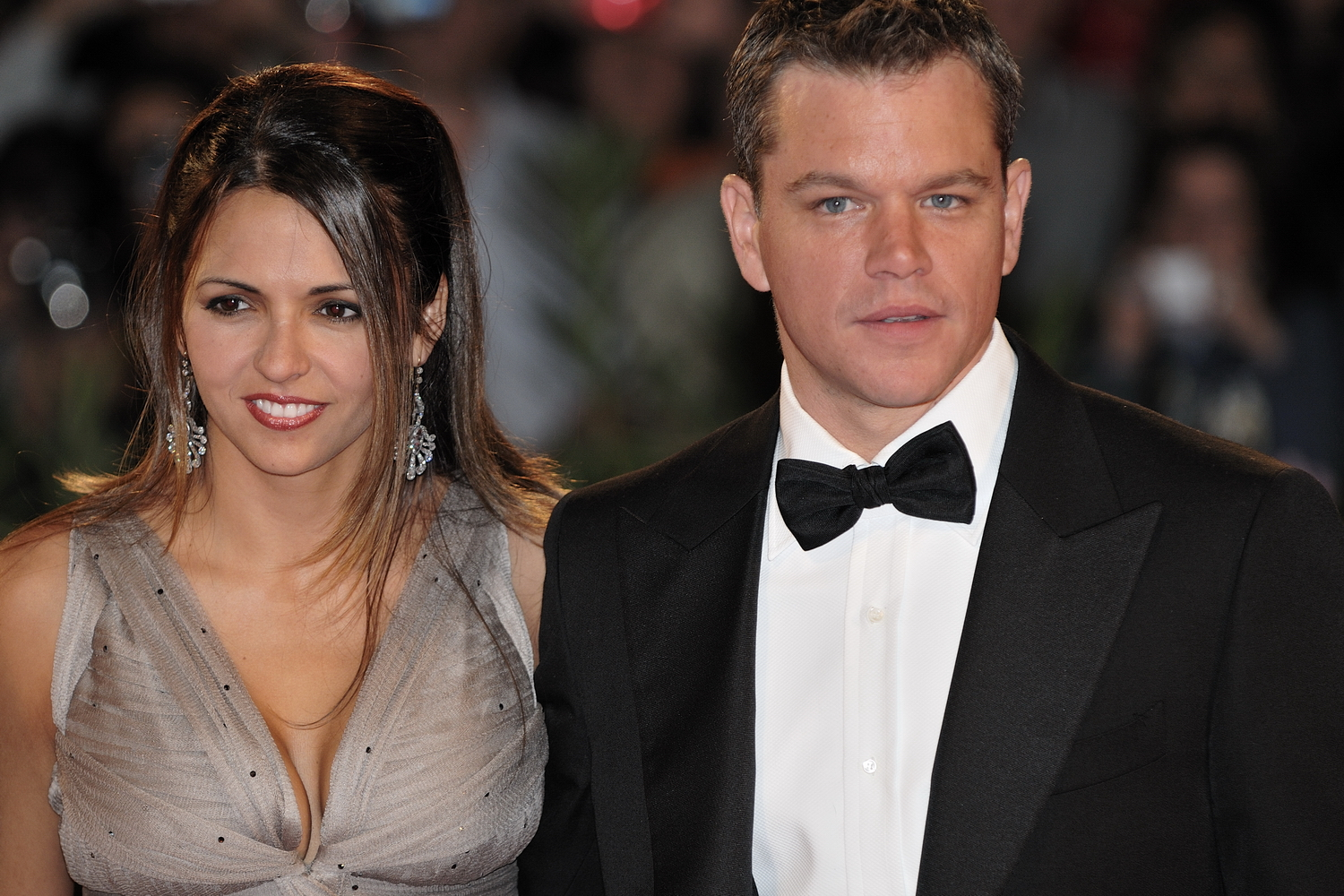 66ème Festival du Cinéma de Venise (Mostra), 6ème jour (07/09/2009) Tapis rouge avec Matt Damon (et sa femme) avec Steven Soderbergh pour le film : The Informant